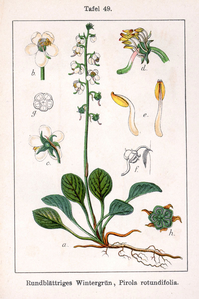 Pyrola rotundifolia L. Original Description Rundblättriges Wintergrün, Pirola rotundifolia